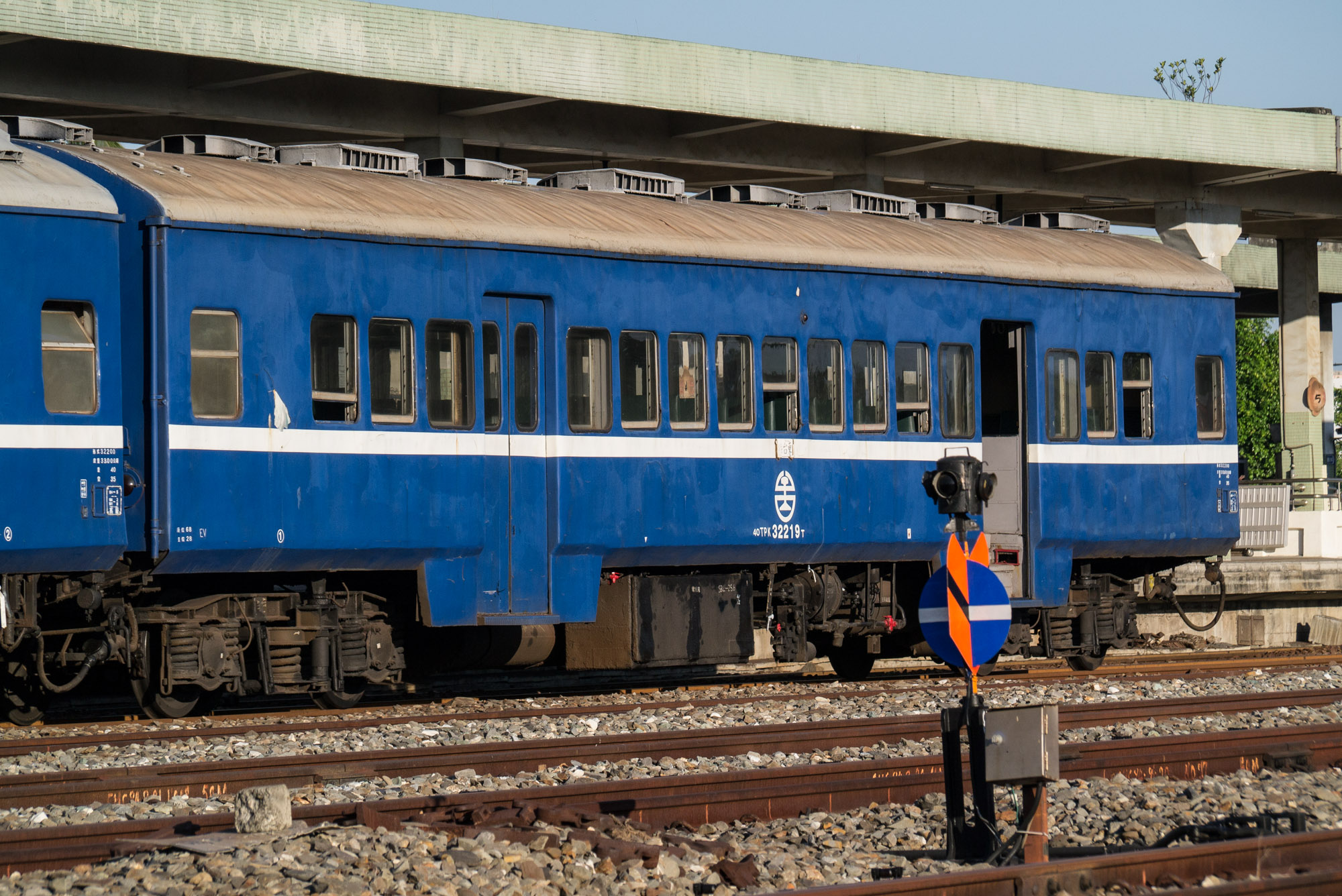 臺灣鐵路管理局普通車車廂40TPK32219T，停靠枋寮車站。